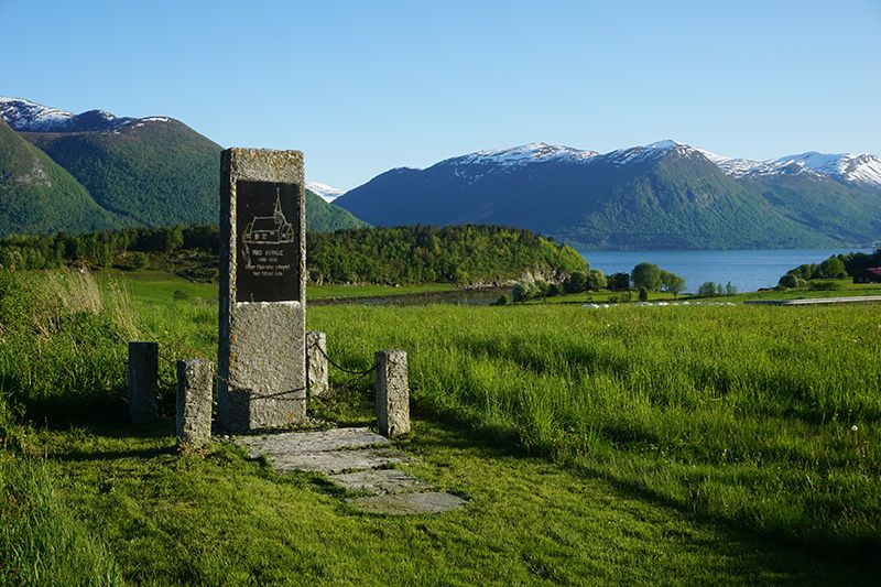 Minnebauta på Rød kirkested, der hovedkirken for Nesset stod tidligere. Foto: Odd Sverre Løset. Fra Riksantikvarens Kulturminnesøk.